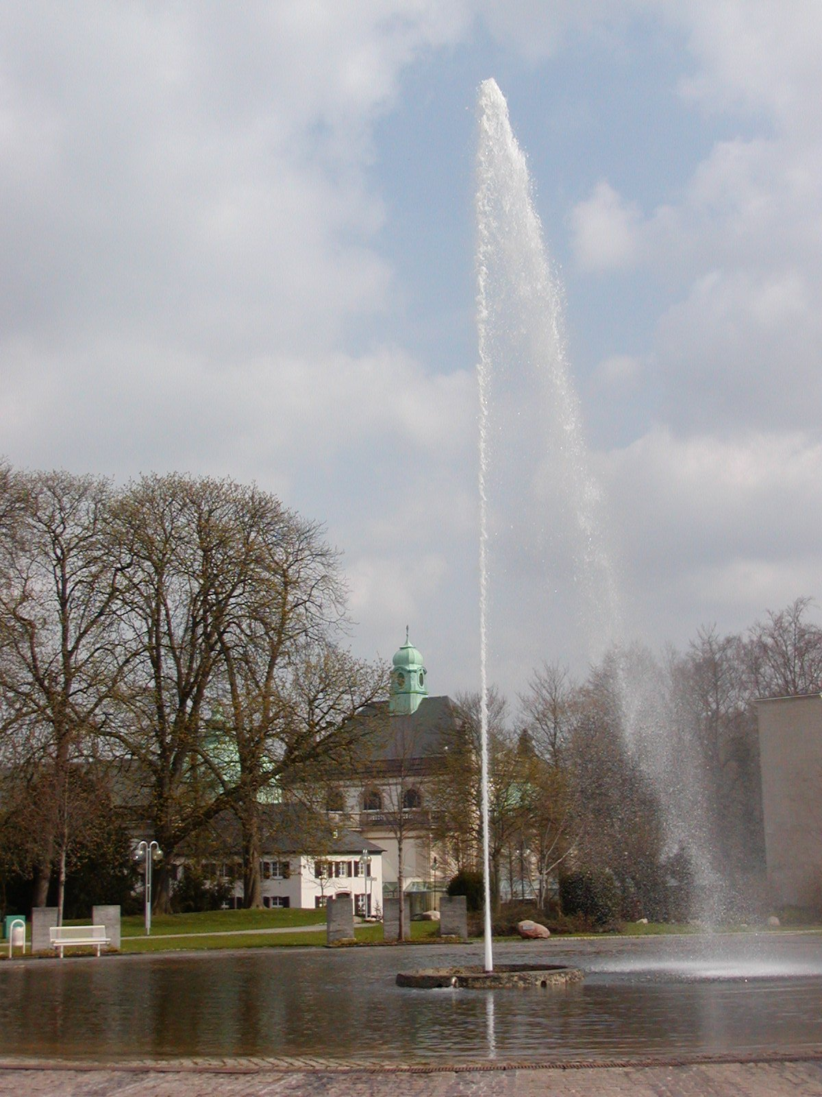 Jordansprudel Bad Oeynhausen Sonstiges